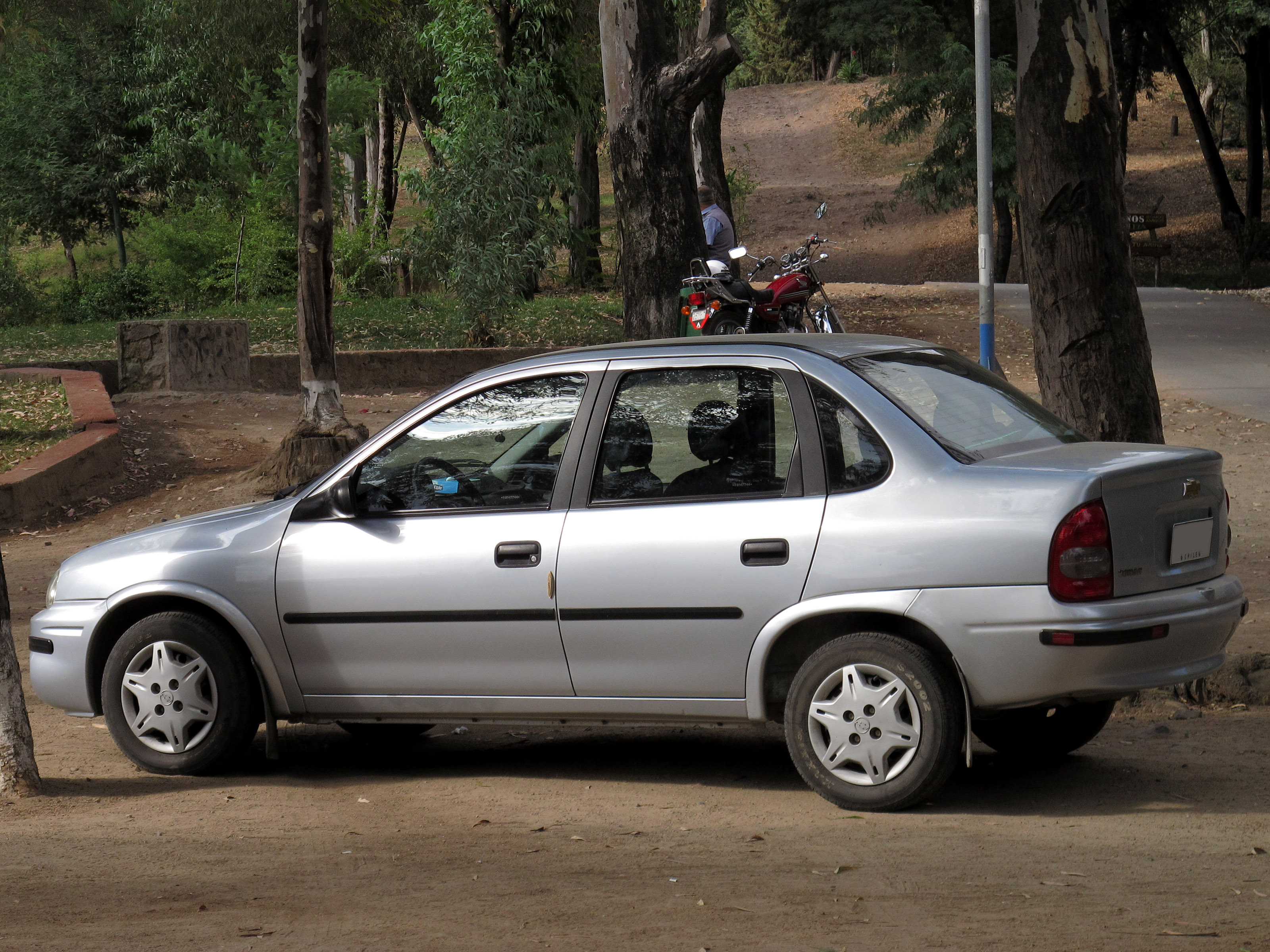 Chevrolet Corsa 1.6 Sedan 2009